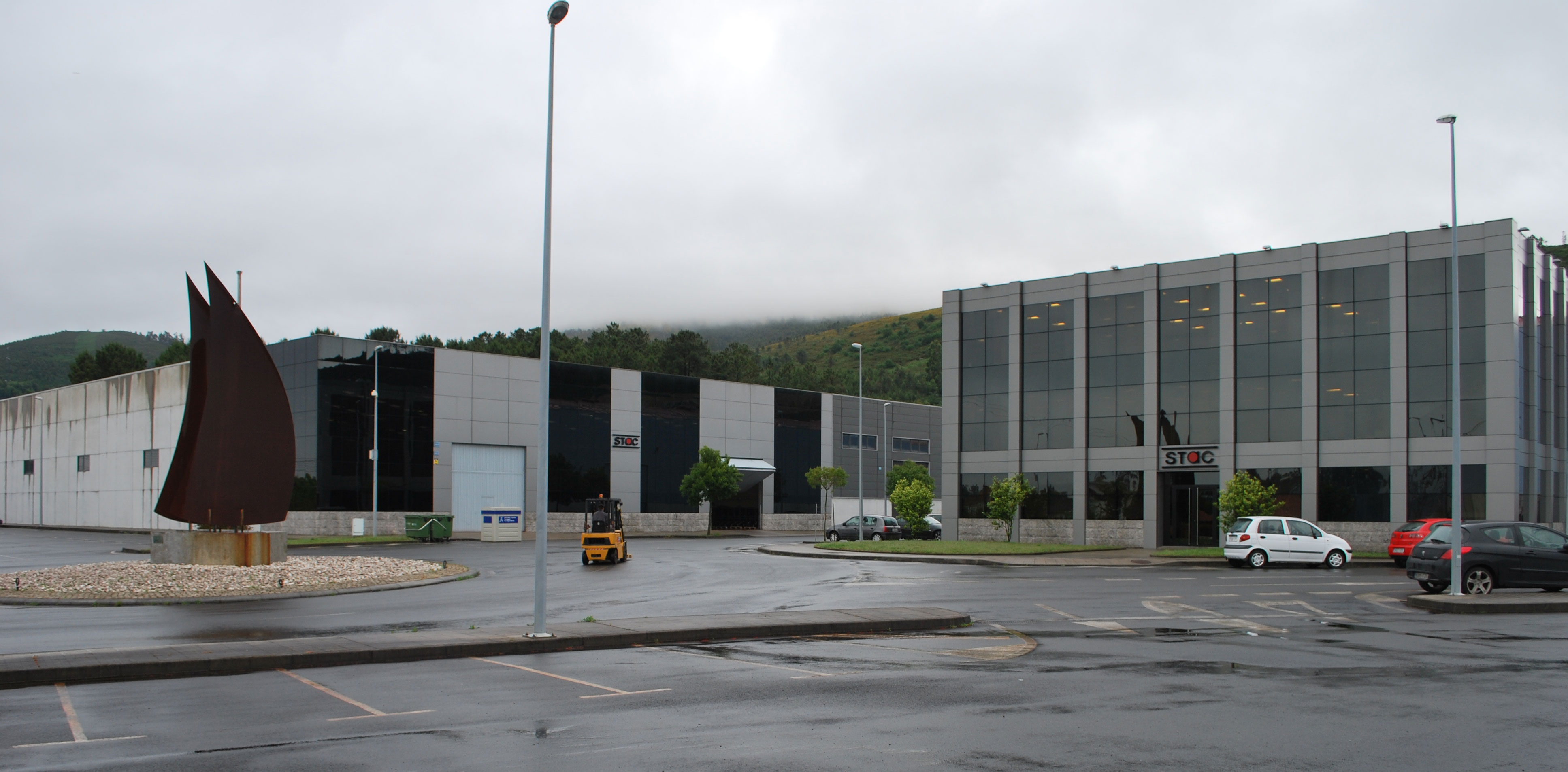 Vista do polígono, Stac en Padrón A Coruña Galiza Spain